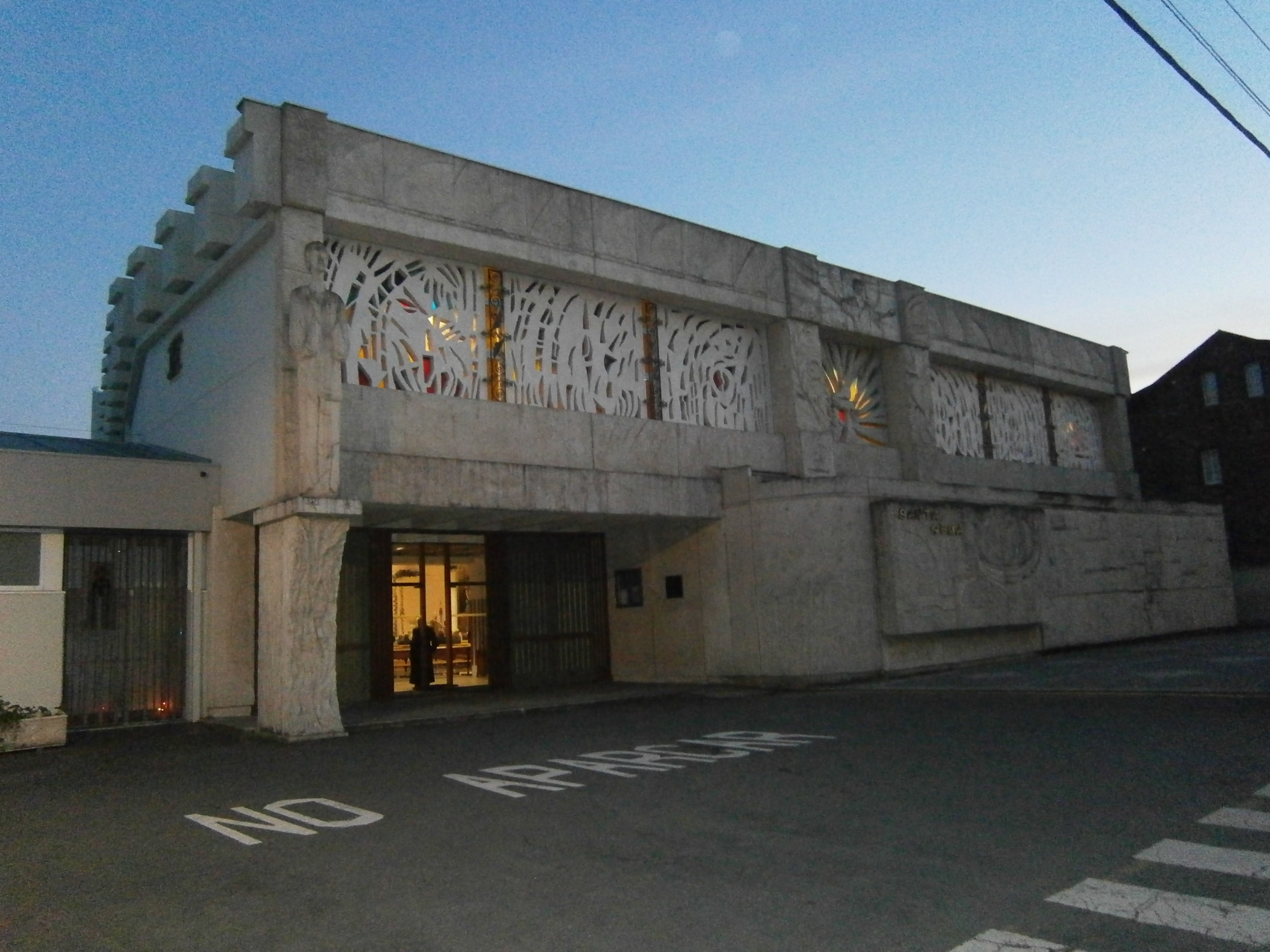 Santuario de Santa Xema, A Coruña